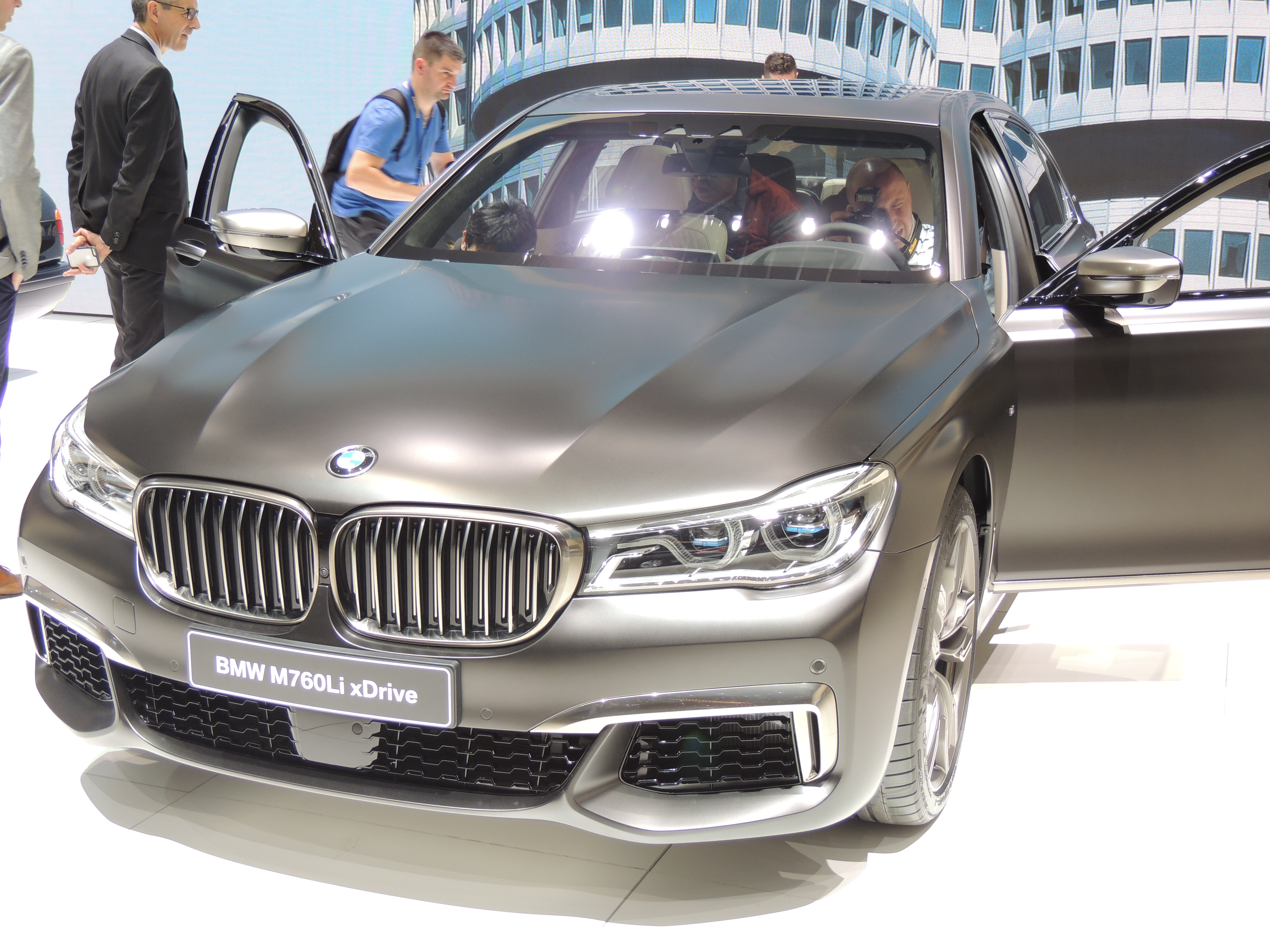 BMW M760Li xDrive, salon de Genève 2016